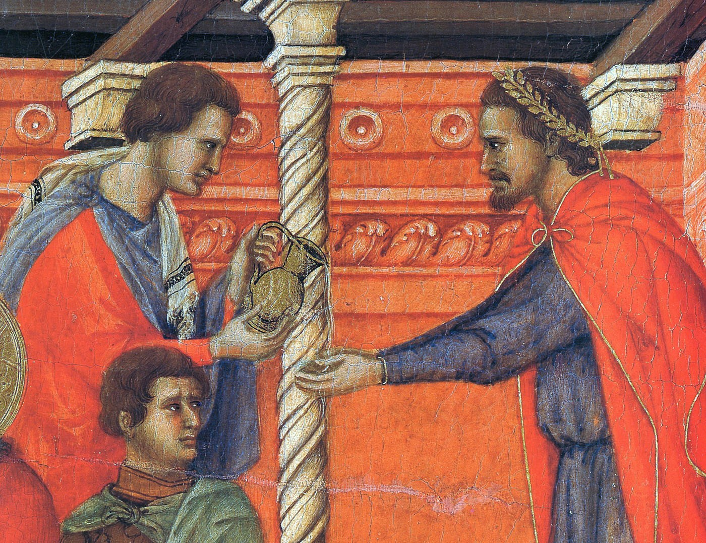 Duccio_maesta_detail4.jpg